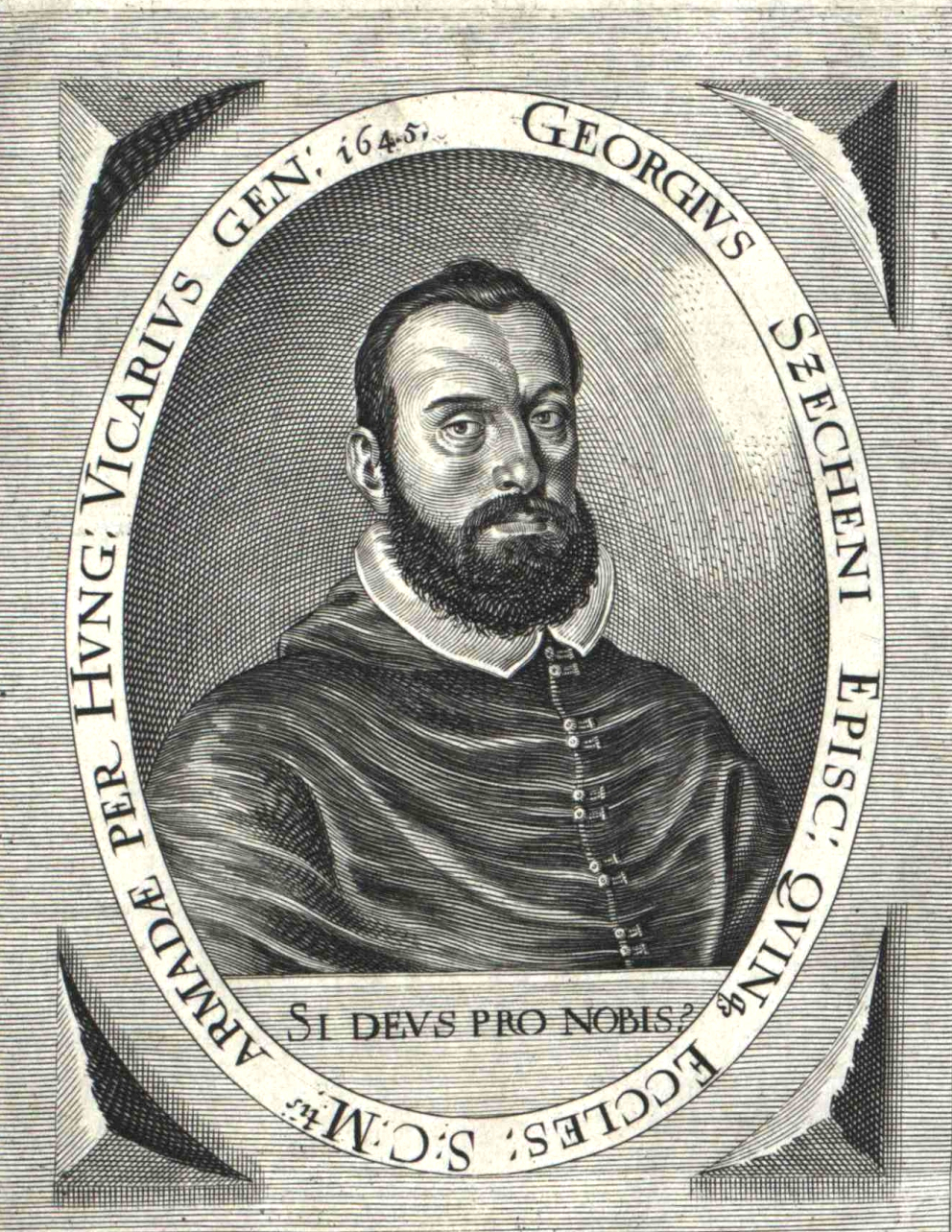 gróf Széchényi György (1592–1695) esztergomi érsek portréja